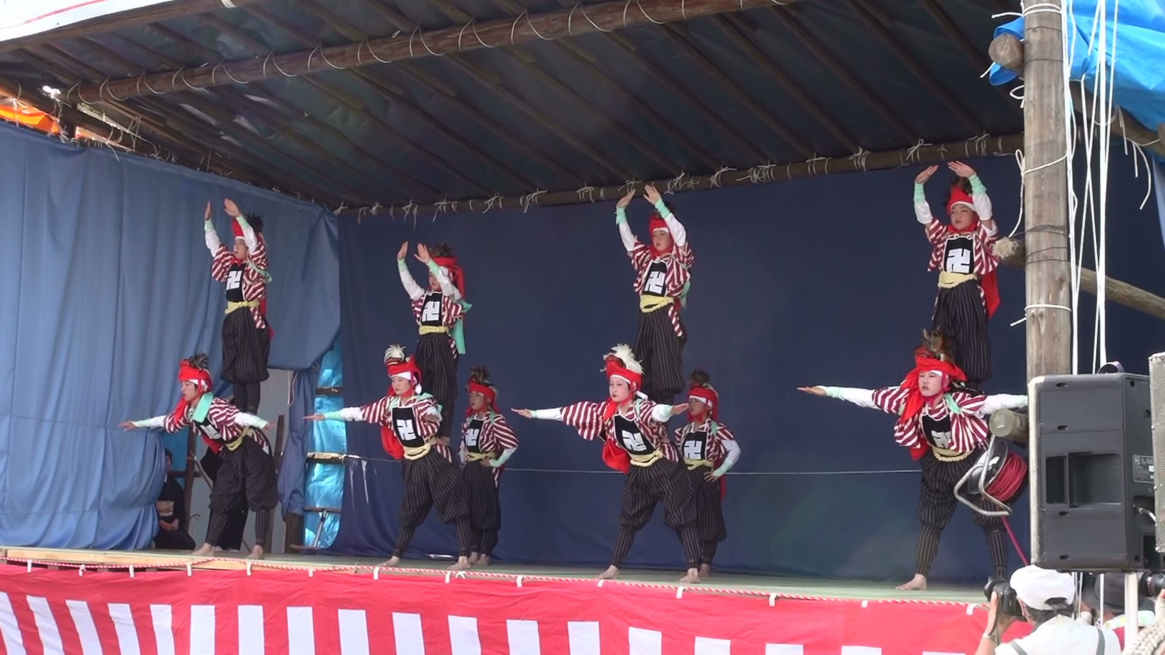 角兵衛獅子 2012年6月24日撮影